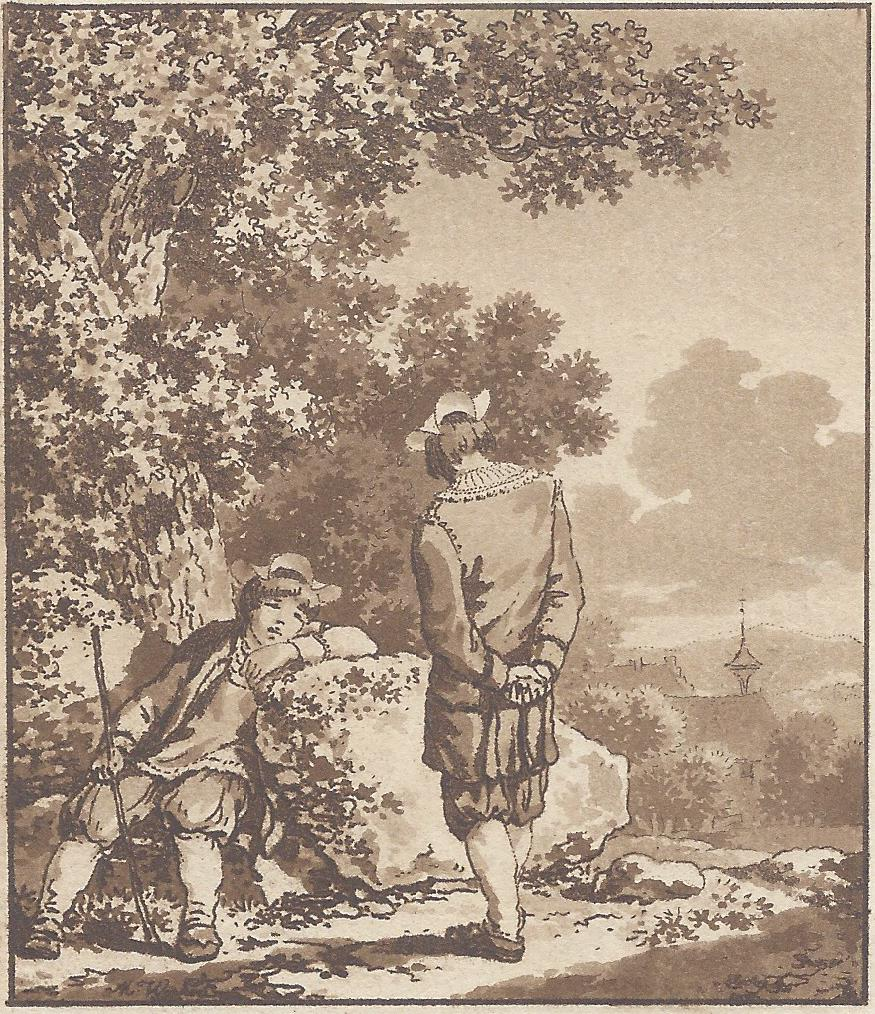 Lümmelnde hauensteiner Hirten. Die Hütejungen werden als säumig dargestellt; der vordere Hütejunge dreht der Herde den Rücken zu während der hintere eingenickt ist. Aquatintaradierung von Marquard Wocher um 1790, Signatur M. Wocher unten links.